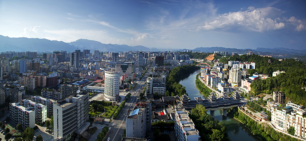 恩施3013